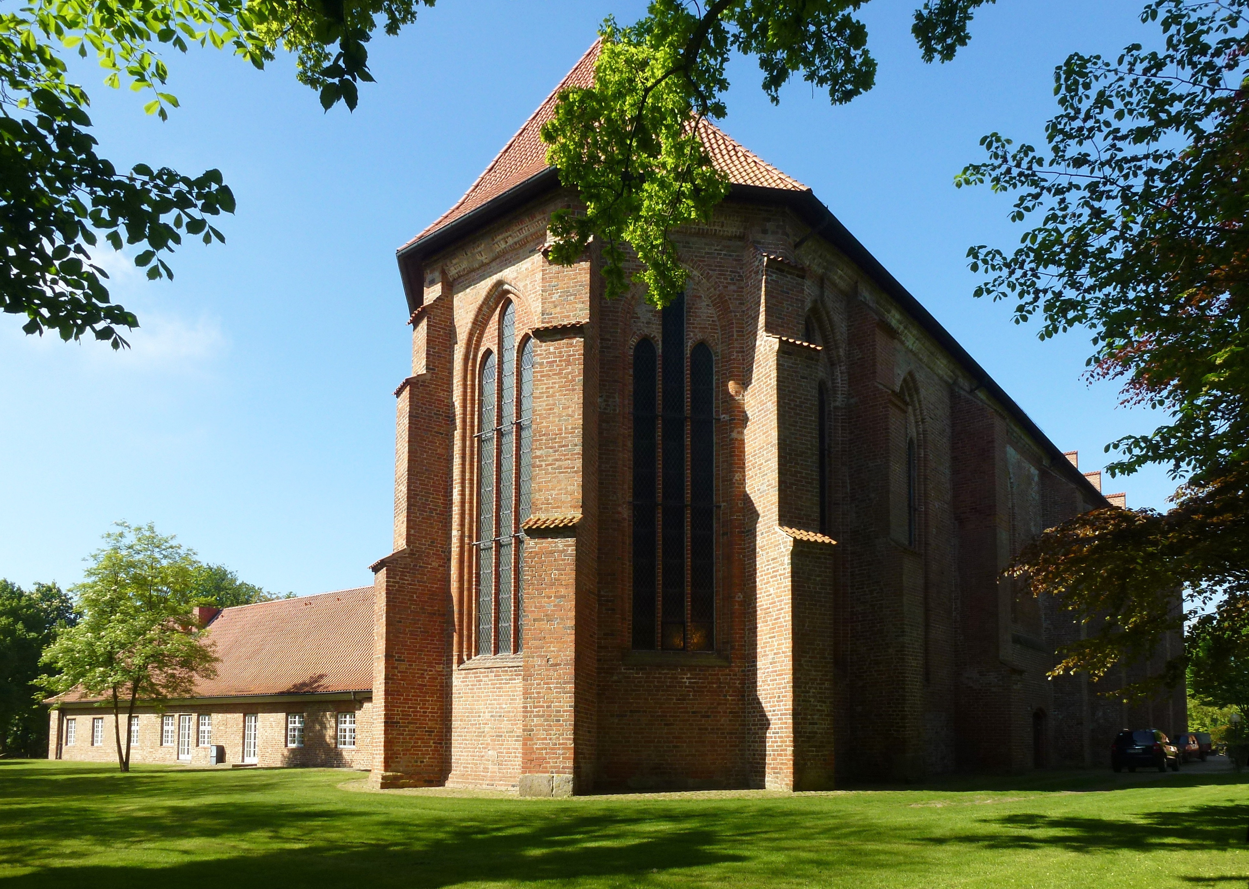 Kloster Cismar